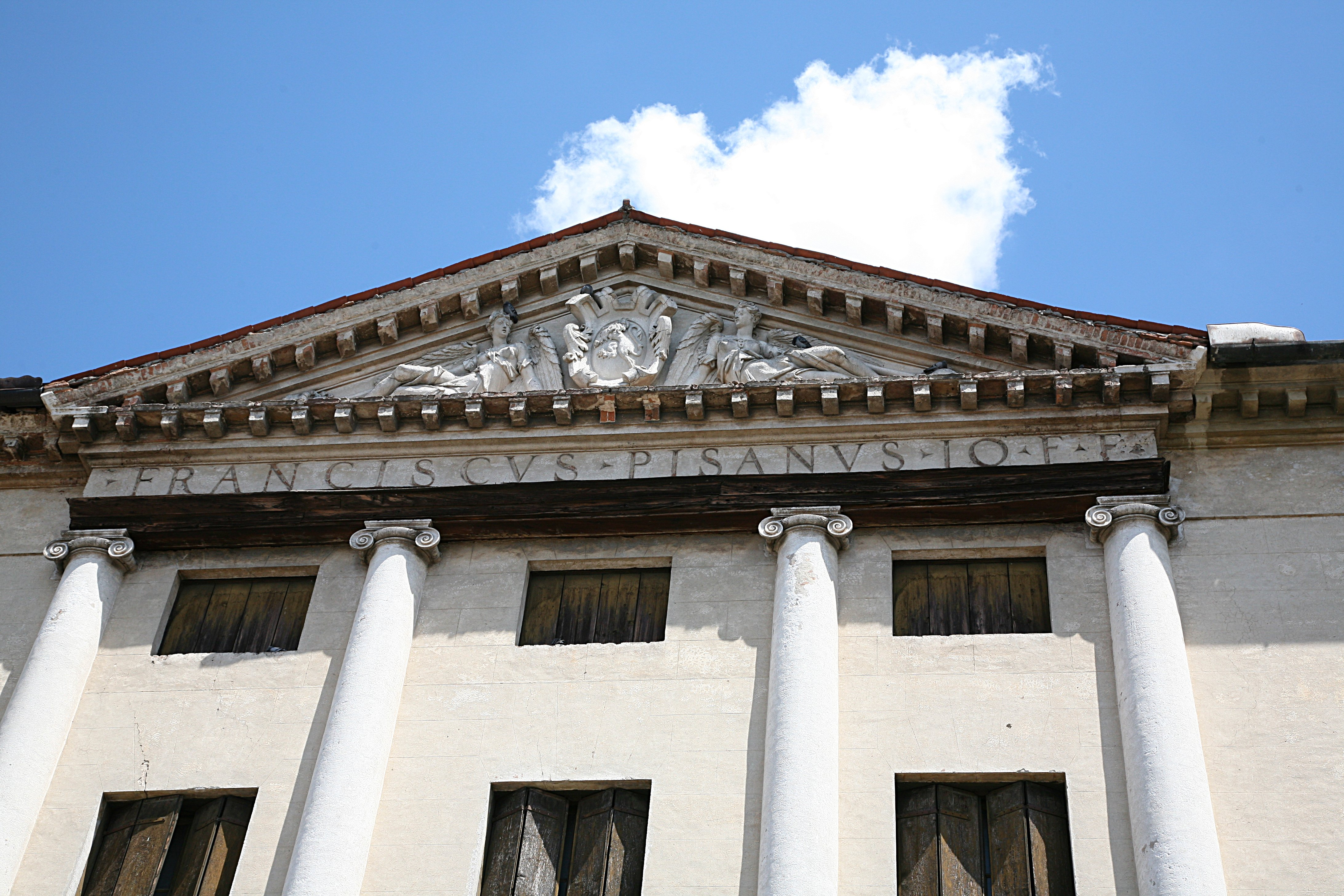 Villa Pisani in Montagnana by Andrea Palladio.